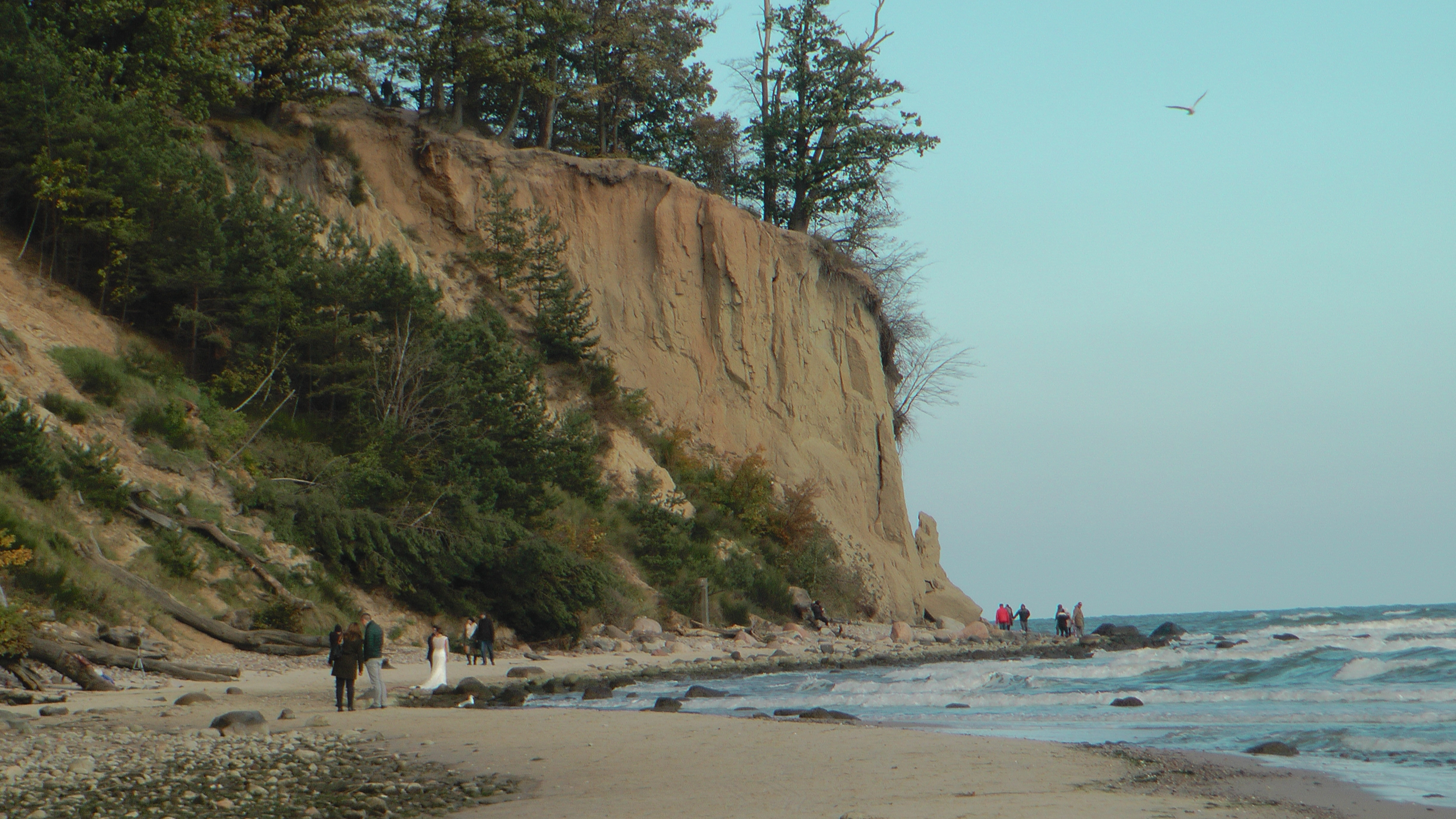 Klif Redłowski od strony Orłowskiego mola